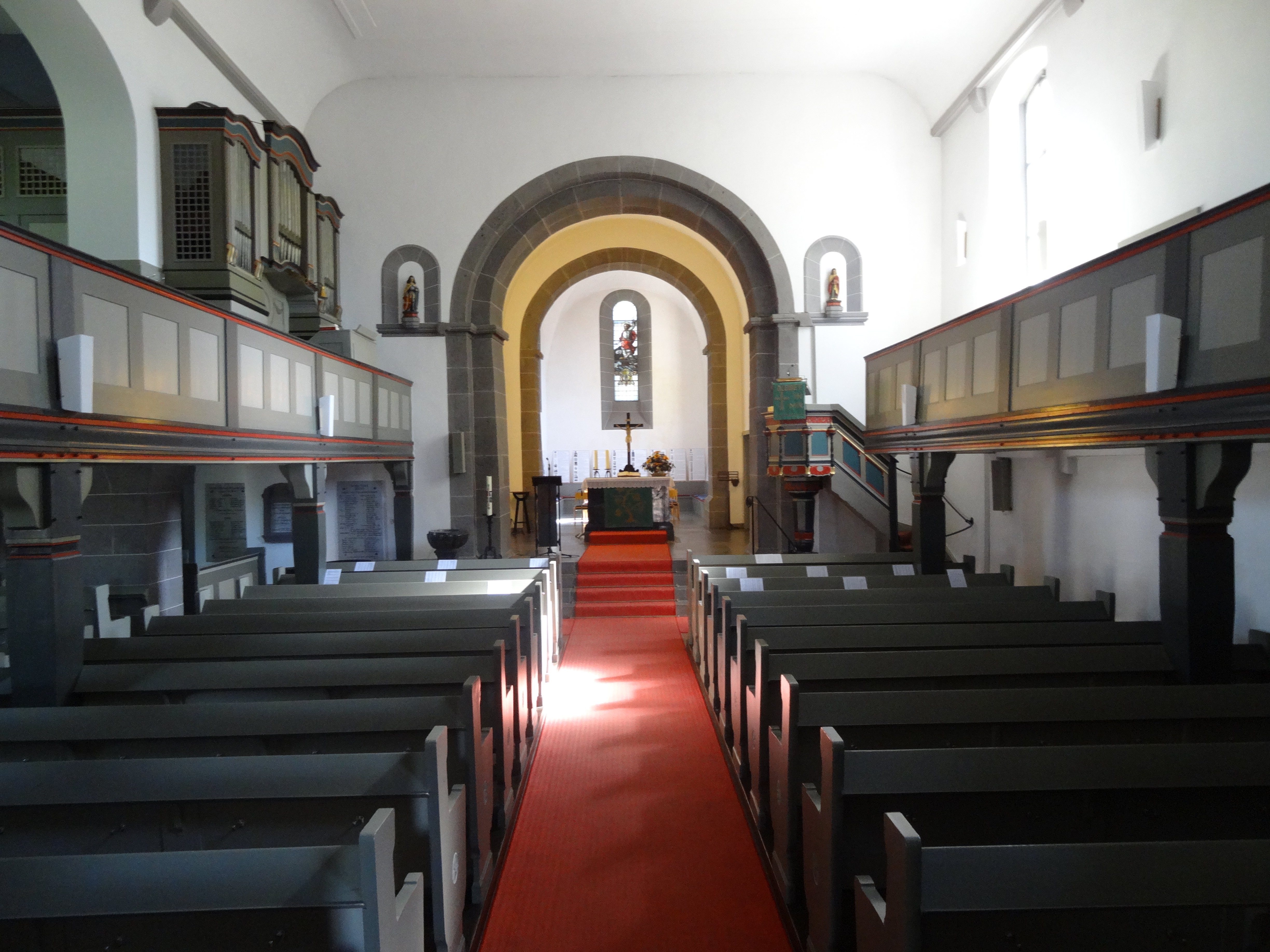 St. Peter (Großen-Linden)